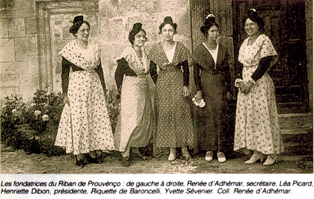 Renée d'Adhémar, Léa Picard, Henriette Dibon, Riquette de Baroncelli, Yvette Sévenier, fondatrices du Riban de Prouvenço